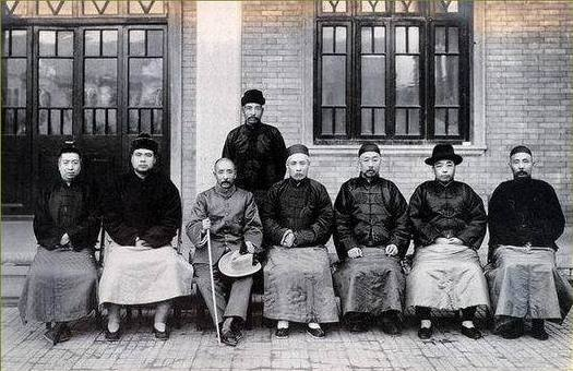 1924年的直奉战争中,直系因冯玉祥发动“北京政变”而失败。11月17日张作霖邀国民军首领冯玉祥在天津日租界下野皖系首领段祺瑞家中会谈,决定拥段为“临时执政”,到北京主持政务。史称“天津会议”。左起：梁鸿志、冯玉祥、张作霖、段祺瑞、卢永祥、杨宇霆、张树元。站立者吴光新（段祺瑞妻弟,曾任陆军总长）。